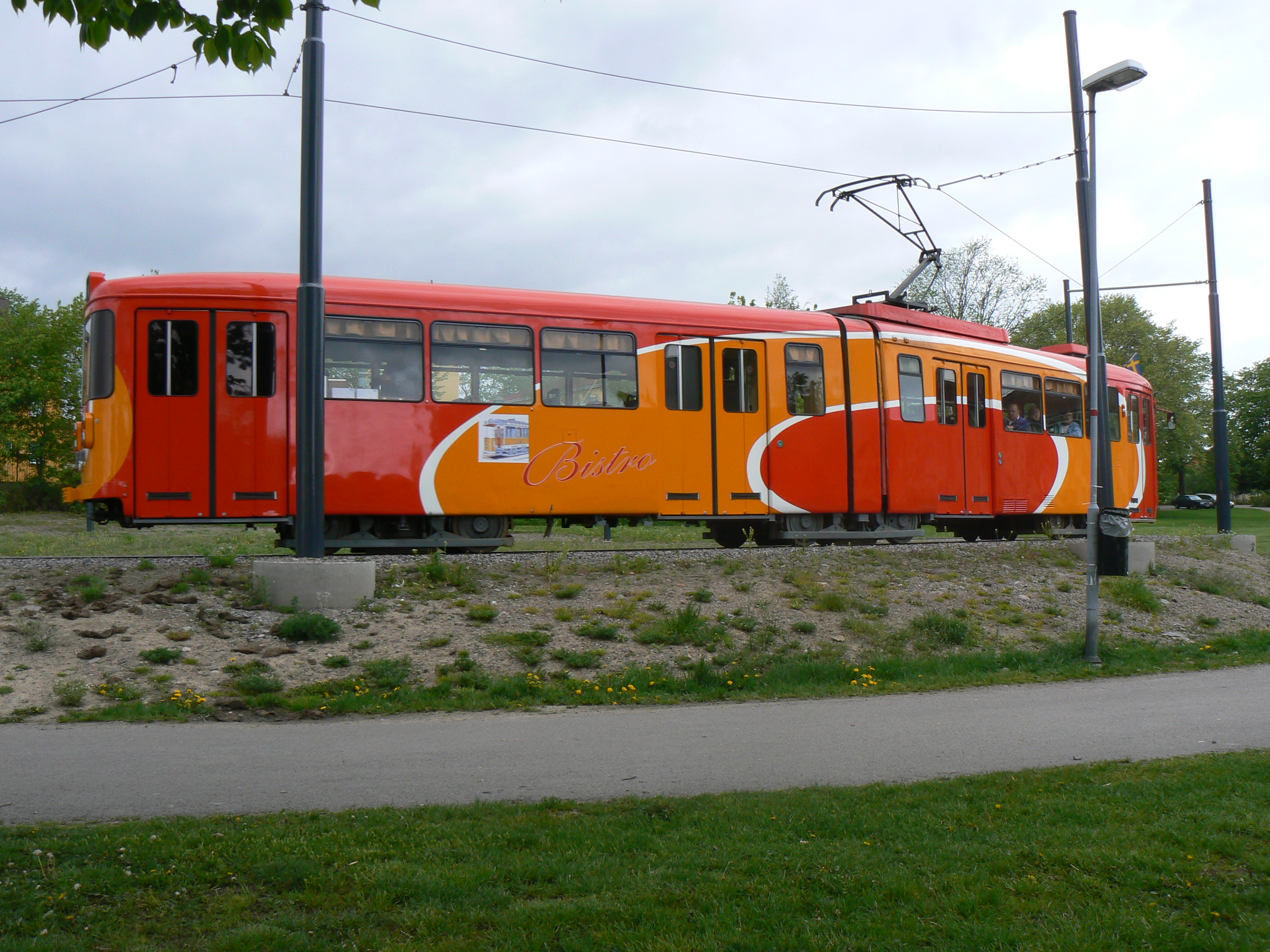 M 94 tram at Ljura in Norrköping, Sweden